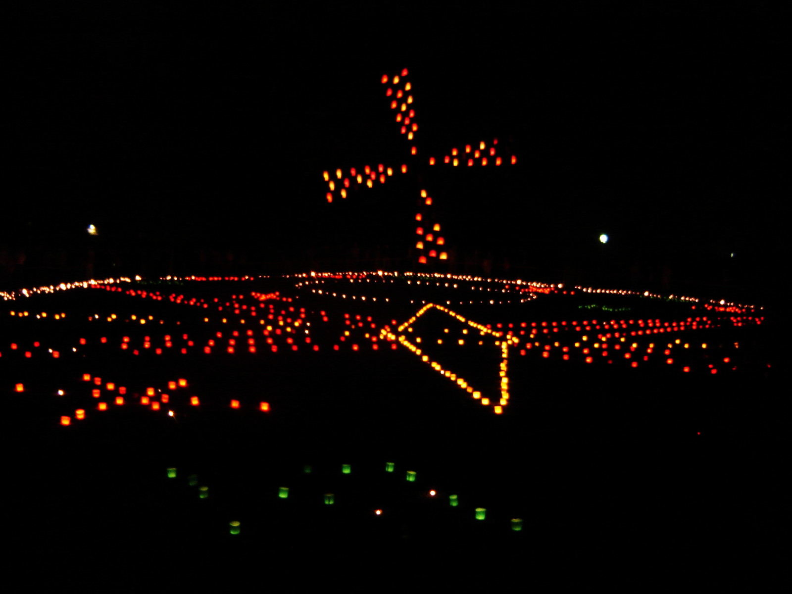 Installation zum Salz- und Lichterfest in Bad Harzburg